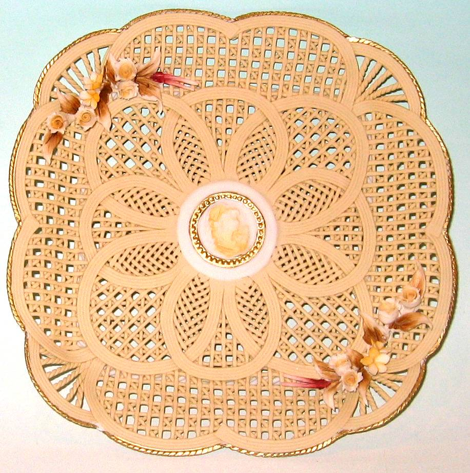 cestino con lavorazione spaghetto